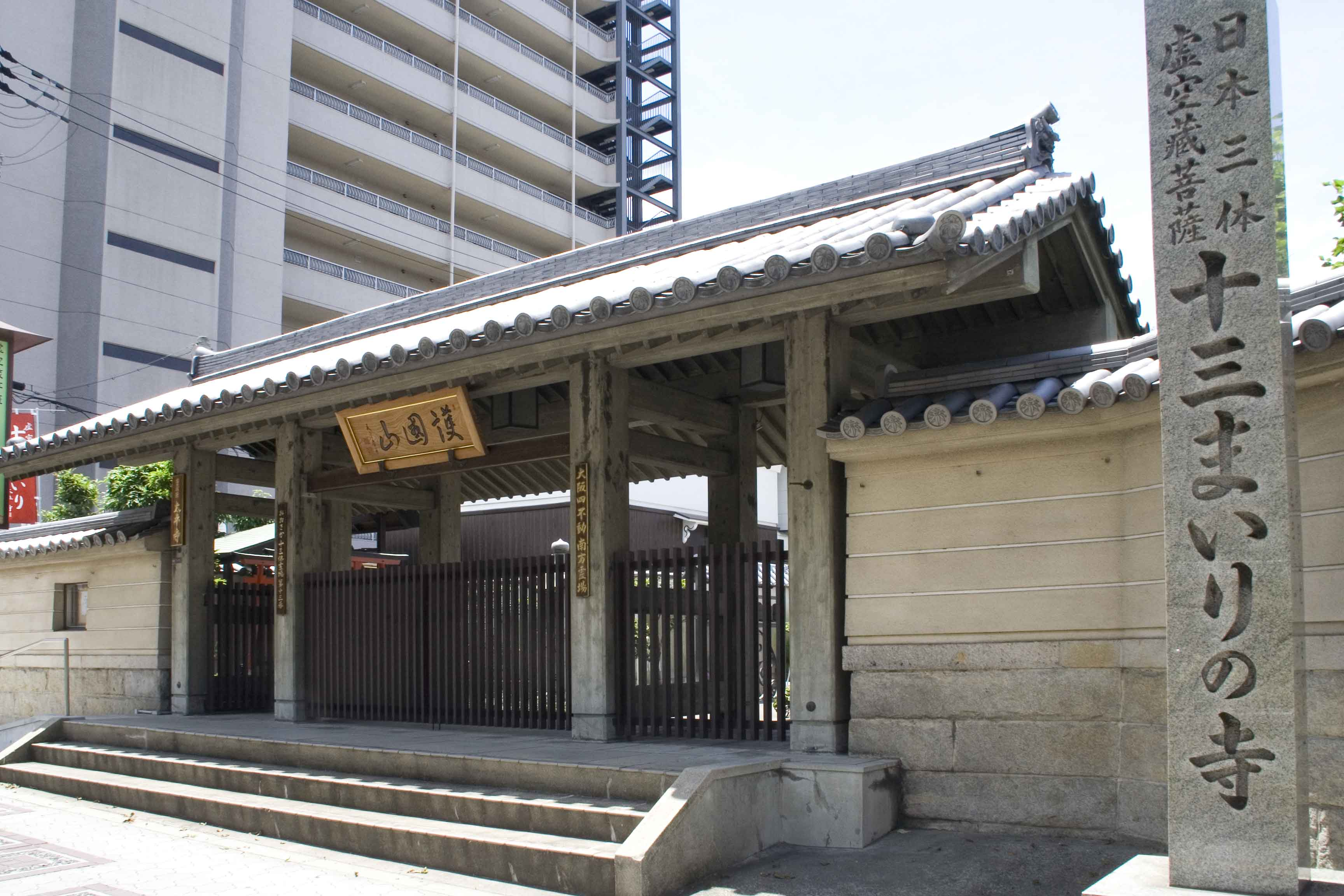 太平寺 (大阪市)